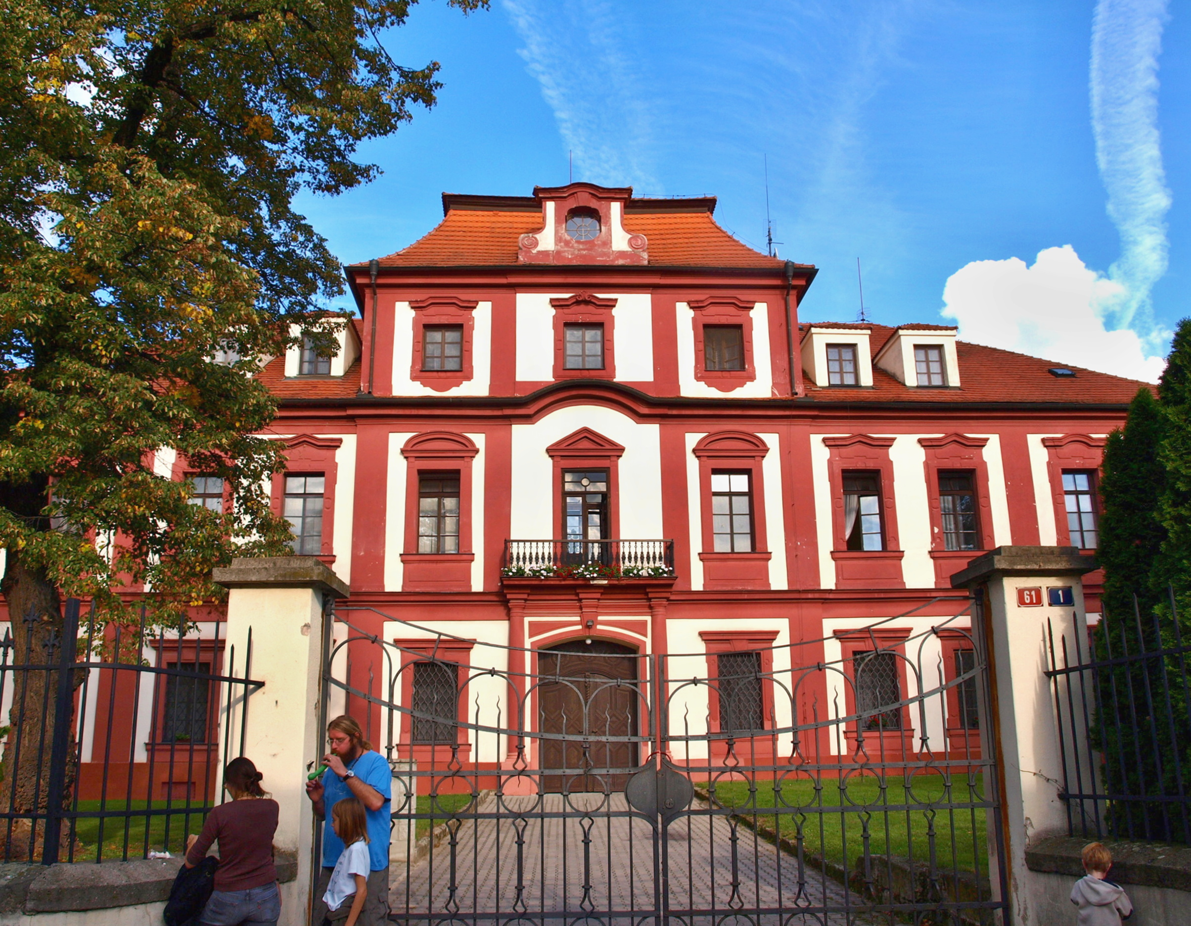 Kostel Nanebevzetí Panny Marie ve Staré Boleslavi